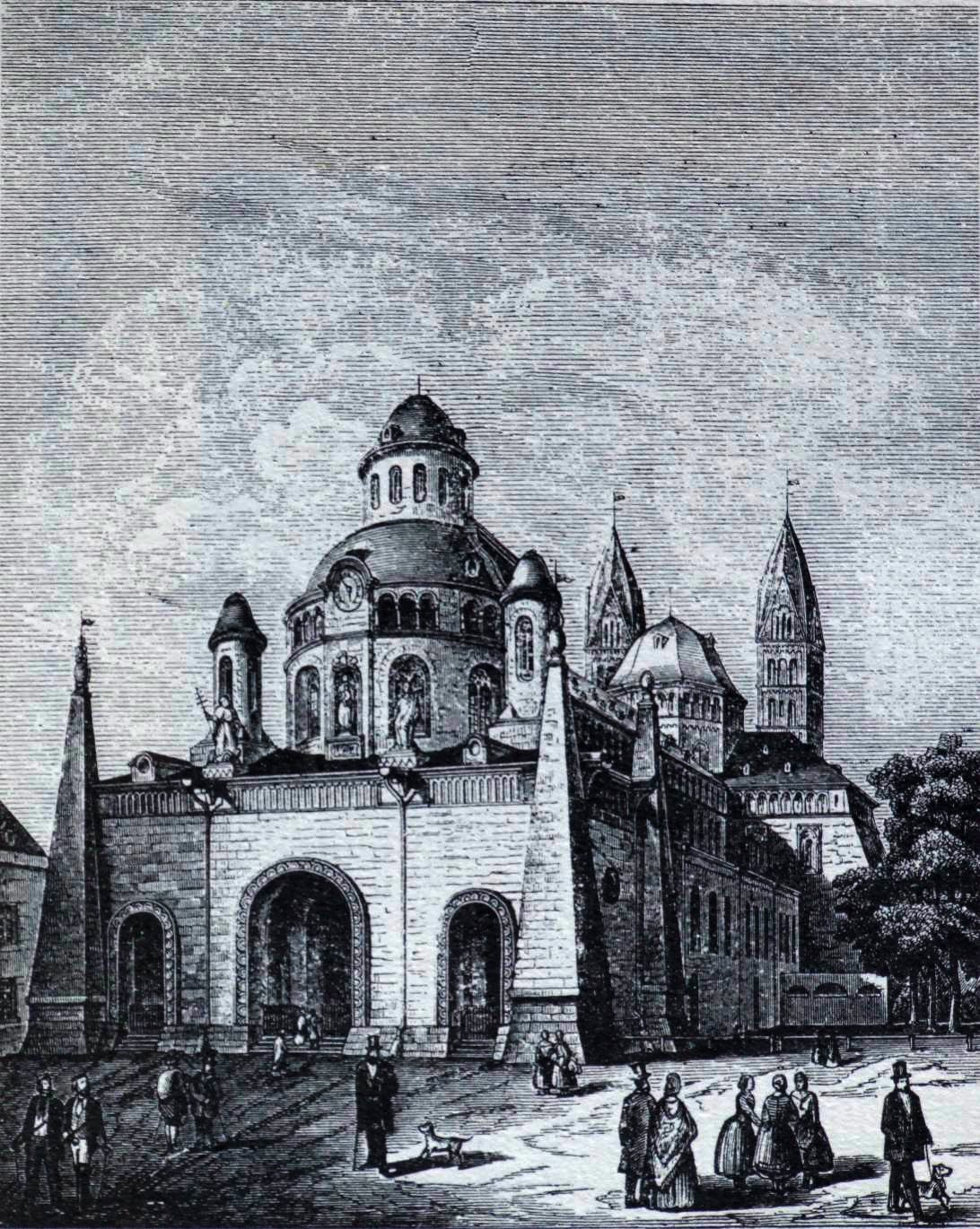 Speyerer Dom mit der barocken Fassade von 1772 bis 1778